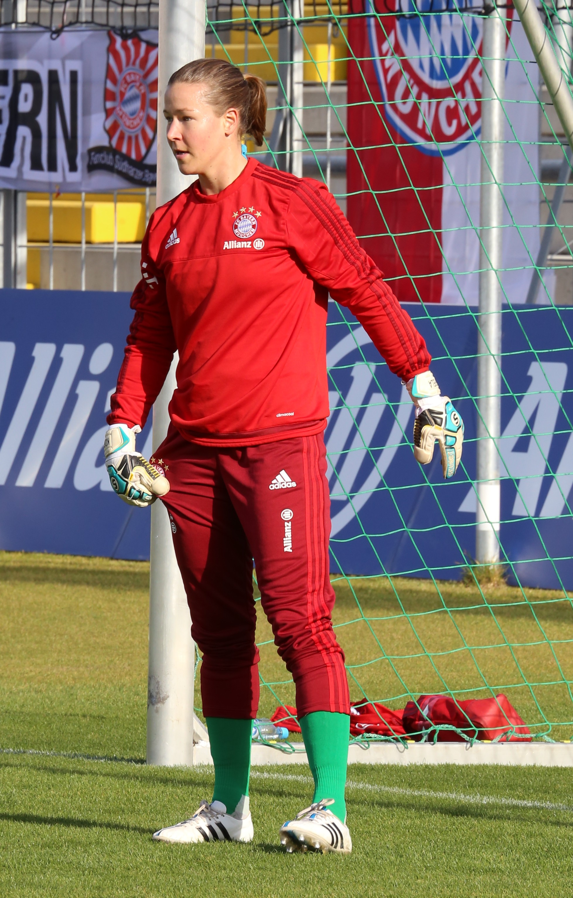 Tinja-Riikka Korpela (FC Bayern München) im DFB-Pokal-Achtelfinale zwischen FC Bayern München und 1. FFC Frankfurt, Ergebnis 2:0, Stadion an der Grünwalder Straße